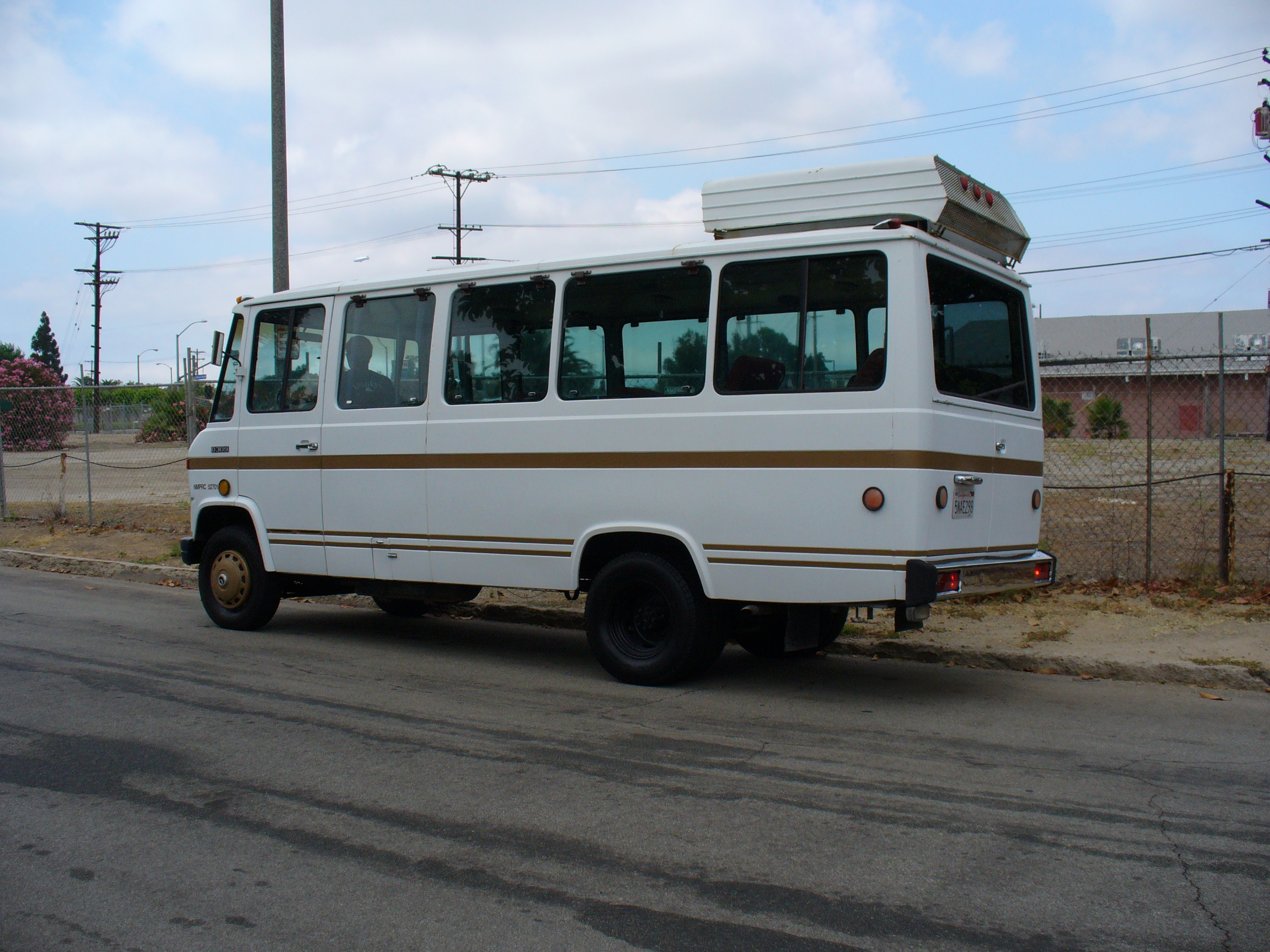 Outside 1972 O309 Mercedes minibus